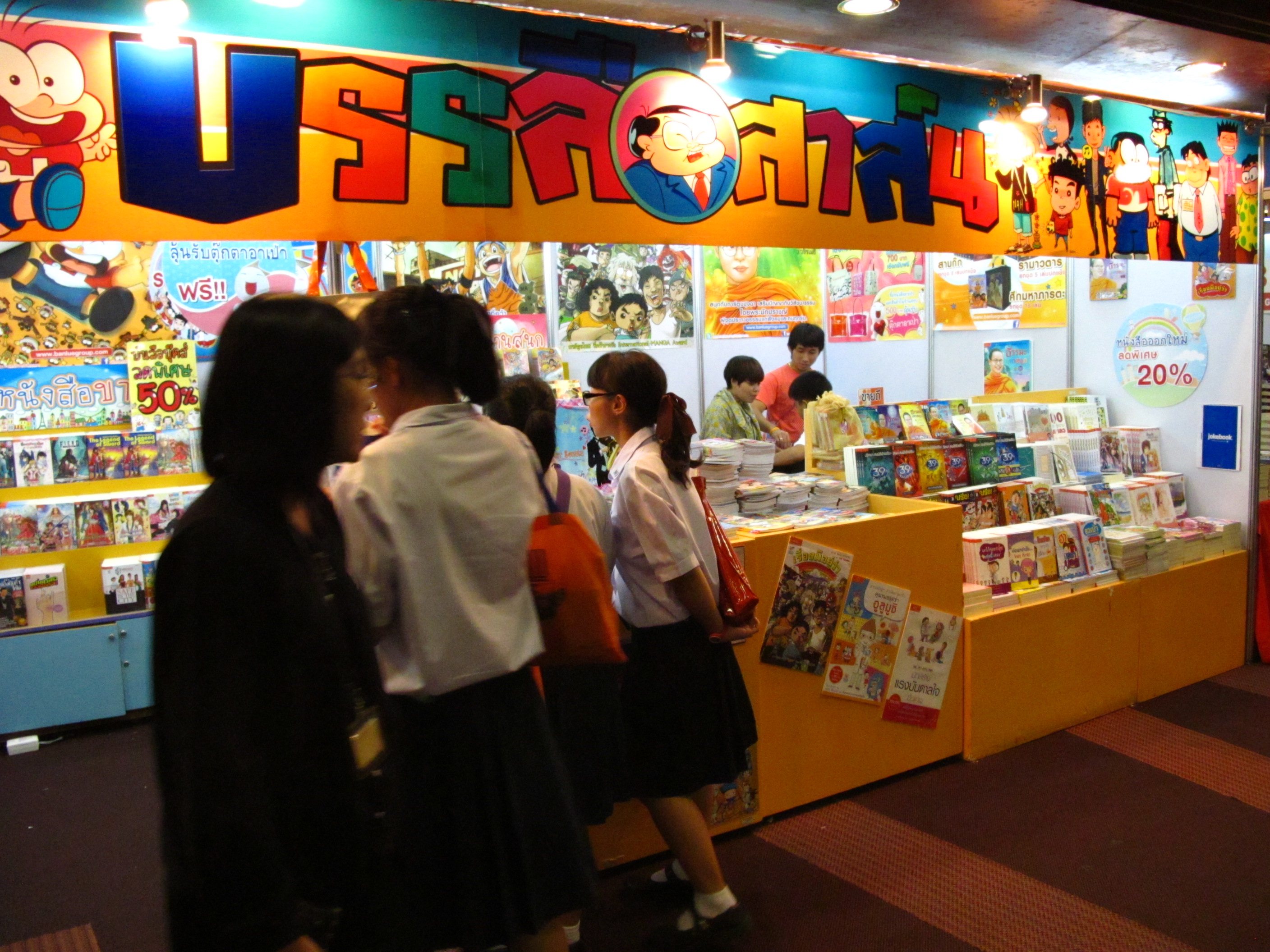 บูธสำนักพิมพ์สำนักพิมพ์บรรลือสาส์น